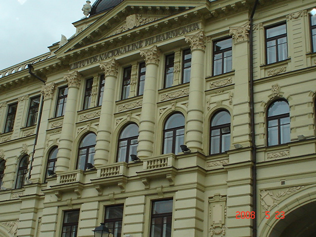 ZABYTKOWA KAMIENICA.